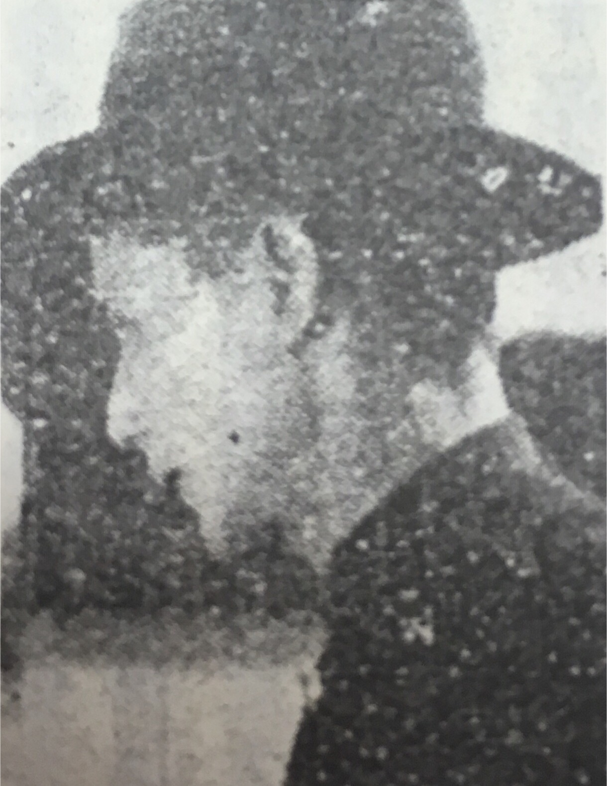 1929年の写真